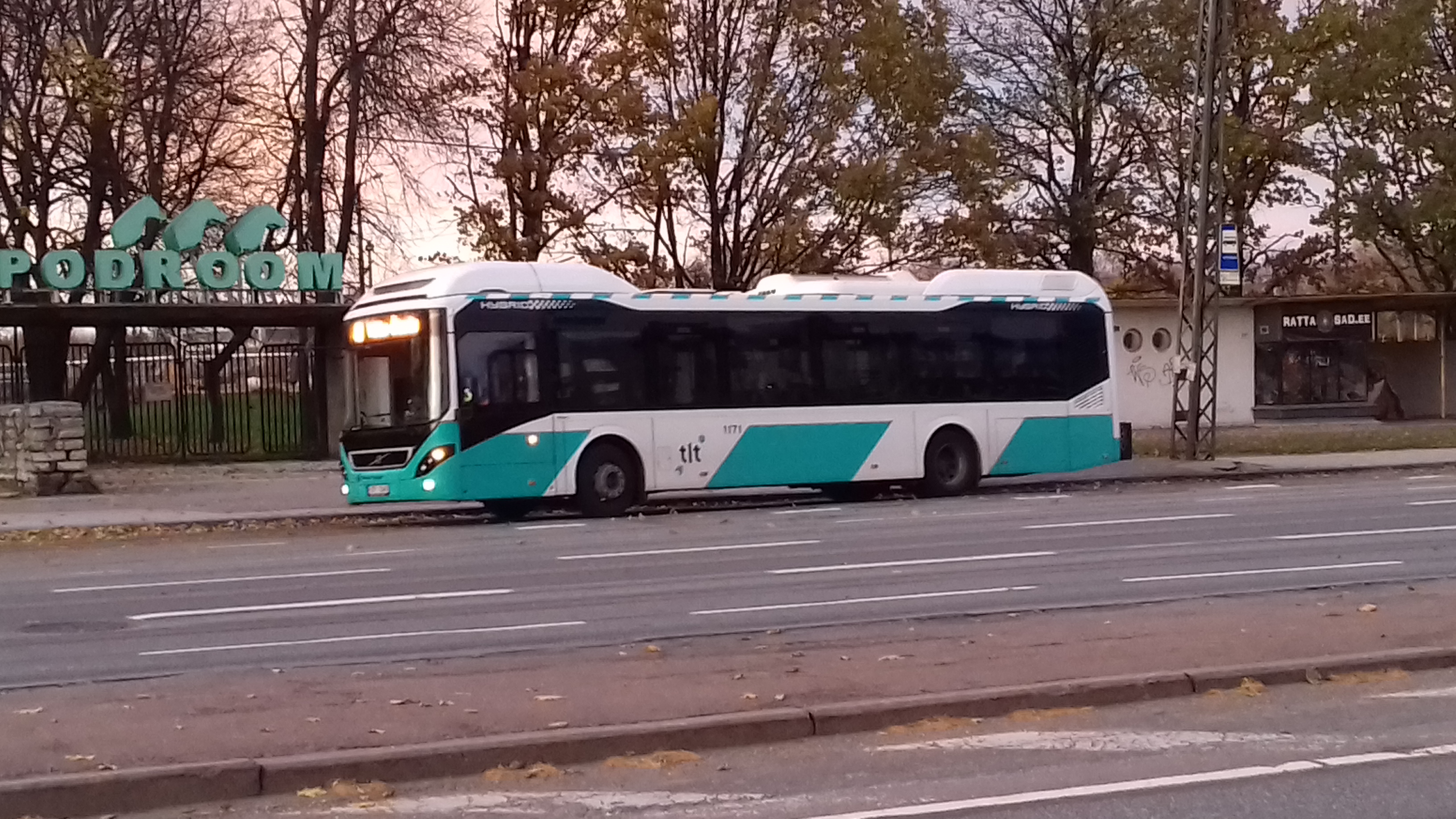 43 Bussilin Hipodroomi peatusel Paldiski maanteel